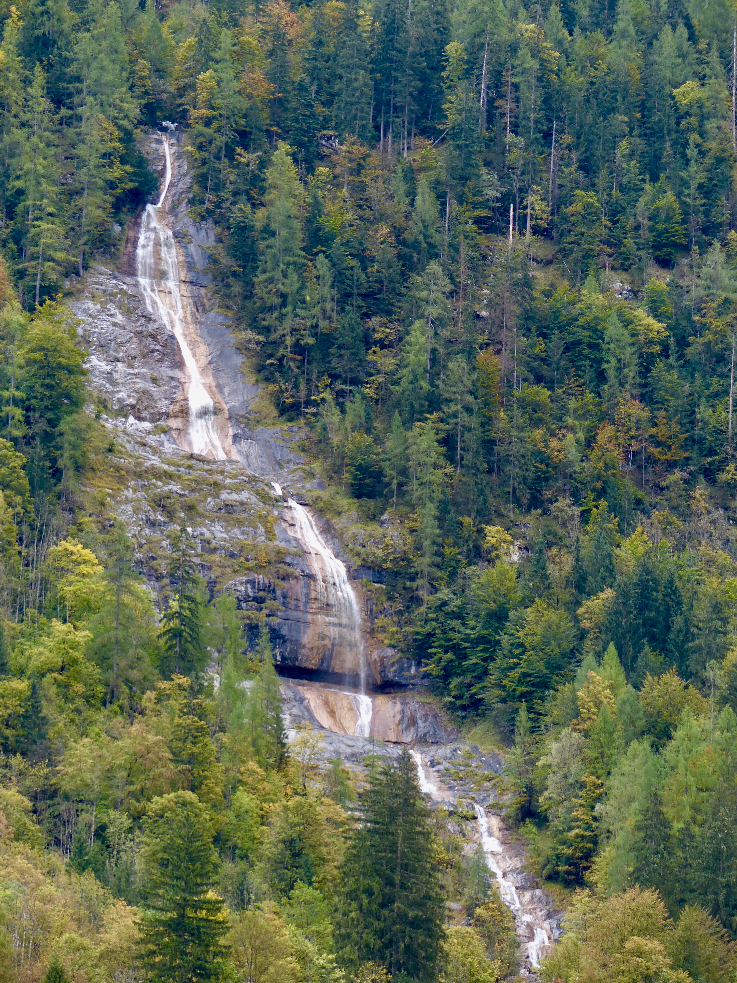 Königssee: Königsbachwasserfall im NP Berchtesgaden